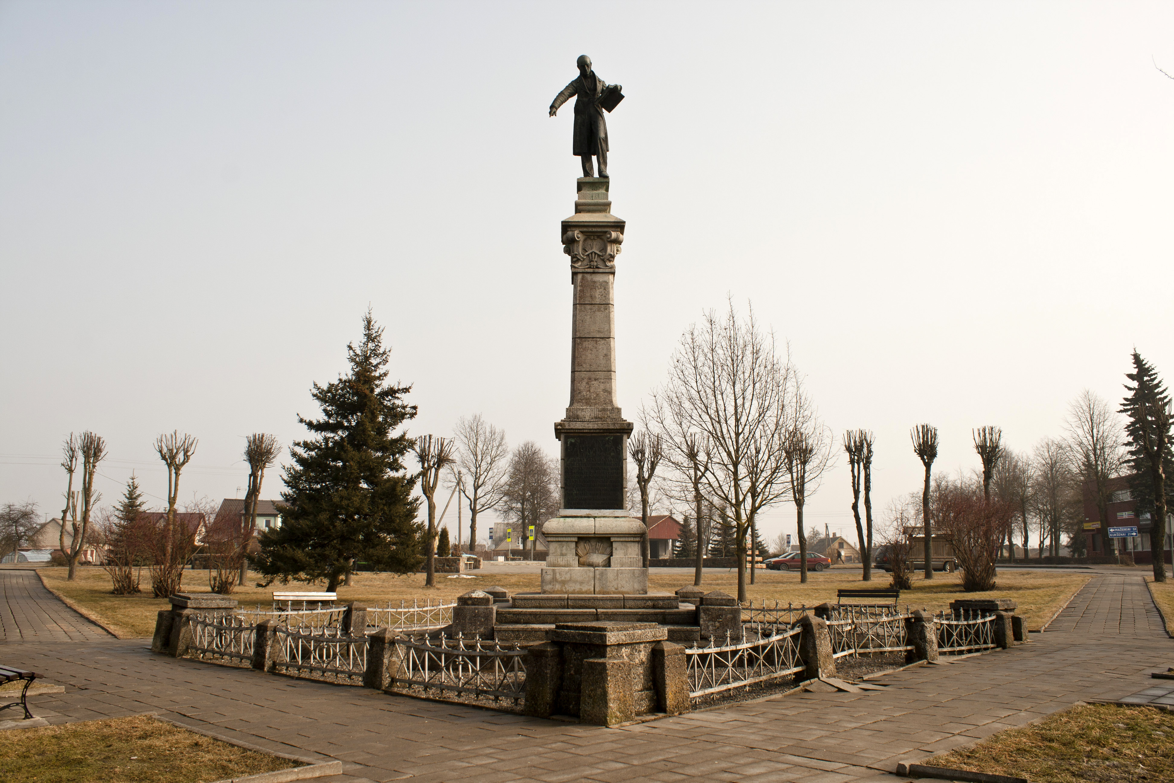 Papile, Simonas Daukantas (1793–1864)